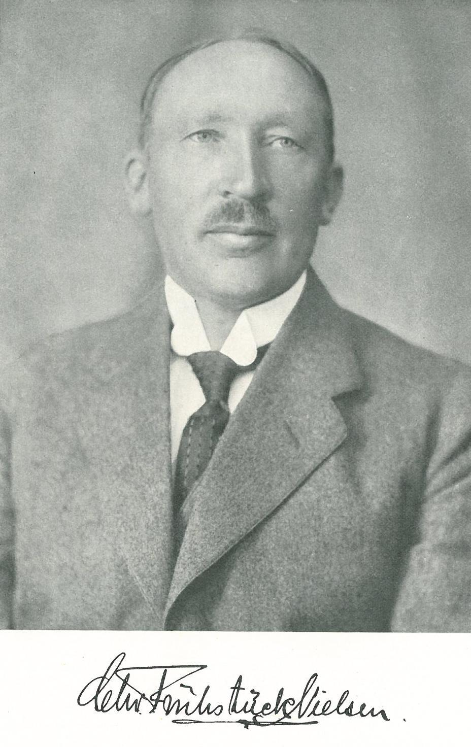 Christian Frühstück Nielsen (1878-1956), Dansk arkitekt